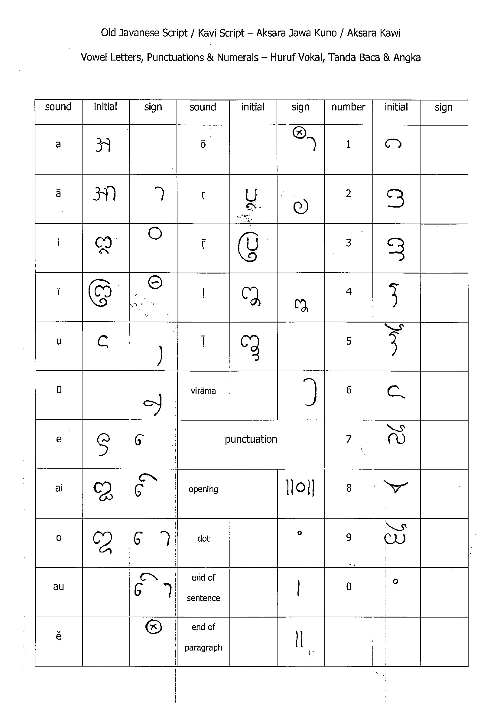 Tabel huruf vokal Aksara Jawa Kuno berdasarkan bentuk standar dari abad VIII - X